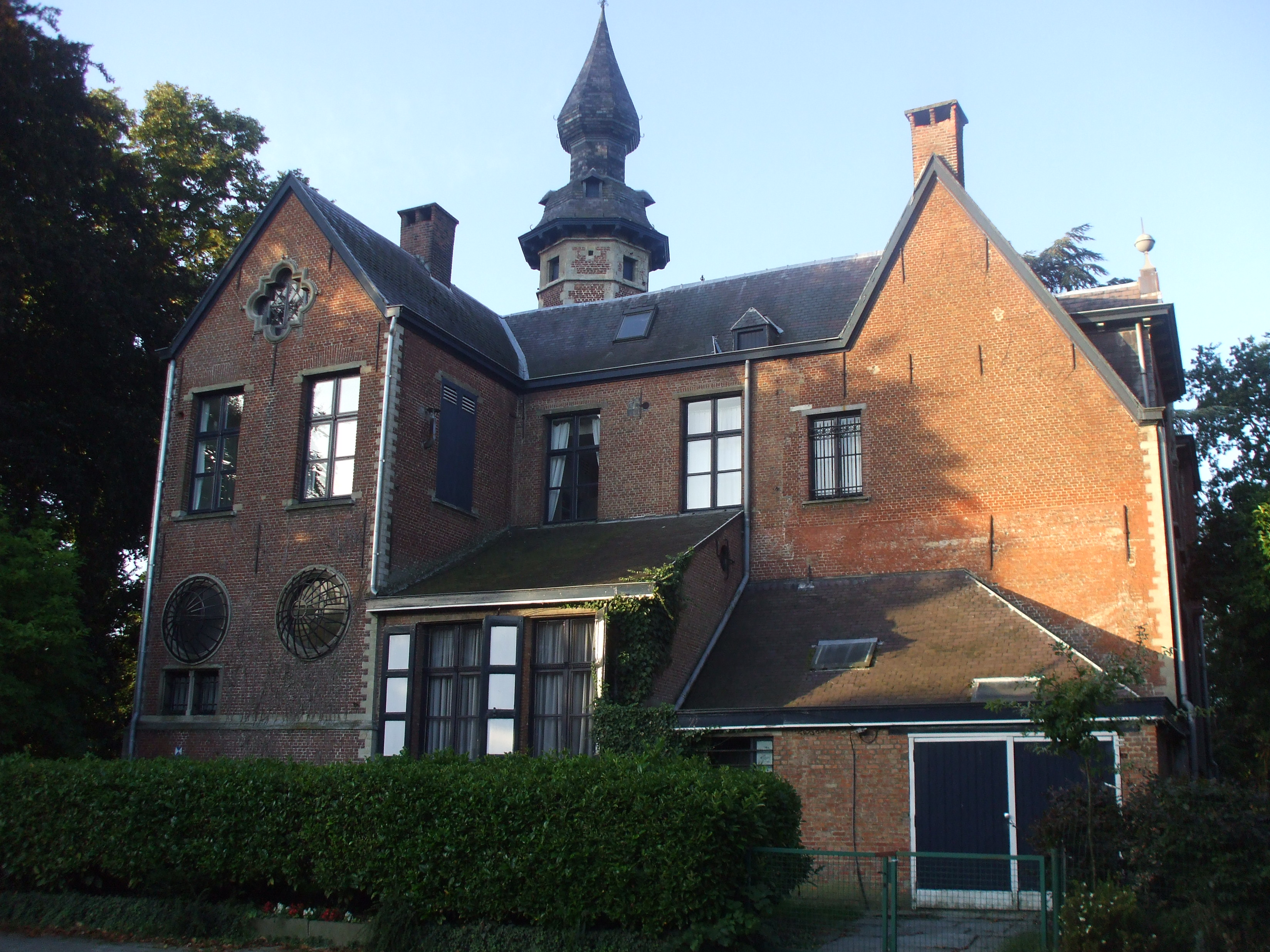 De zijkant van het Hof ten Dorpe in Mortsel.